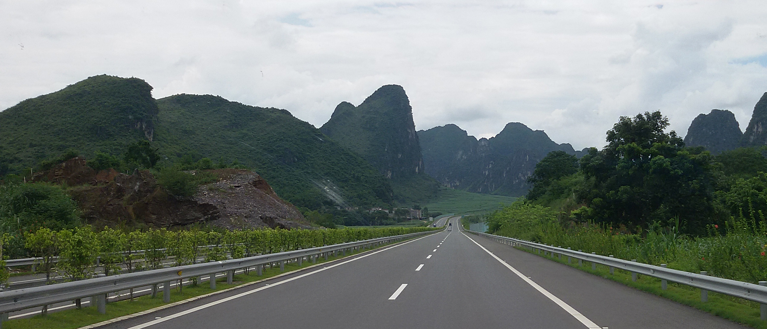 粵語: 合那高速公路（崇左段）